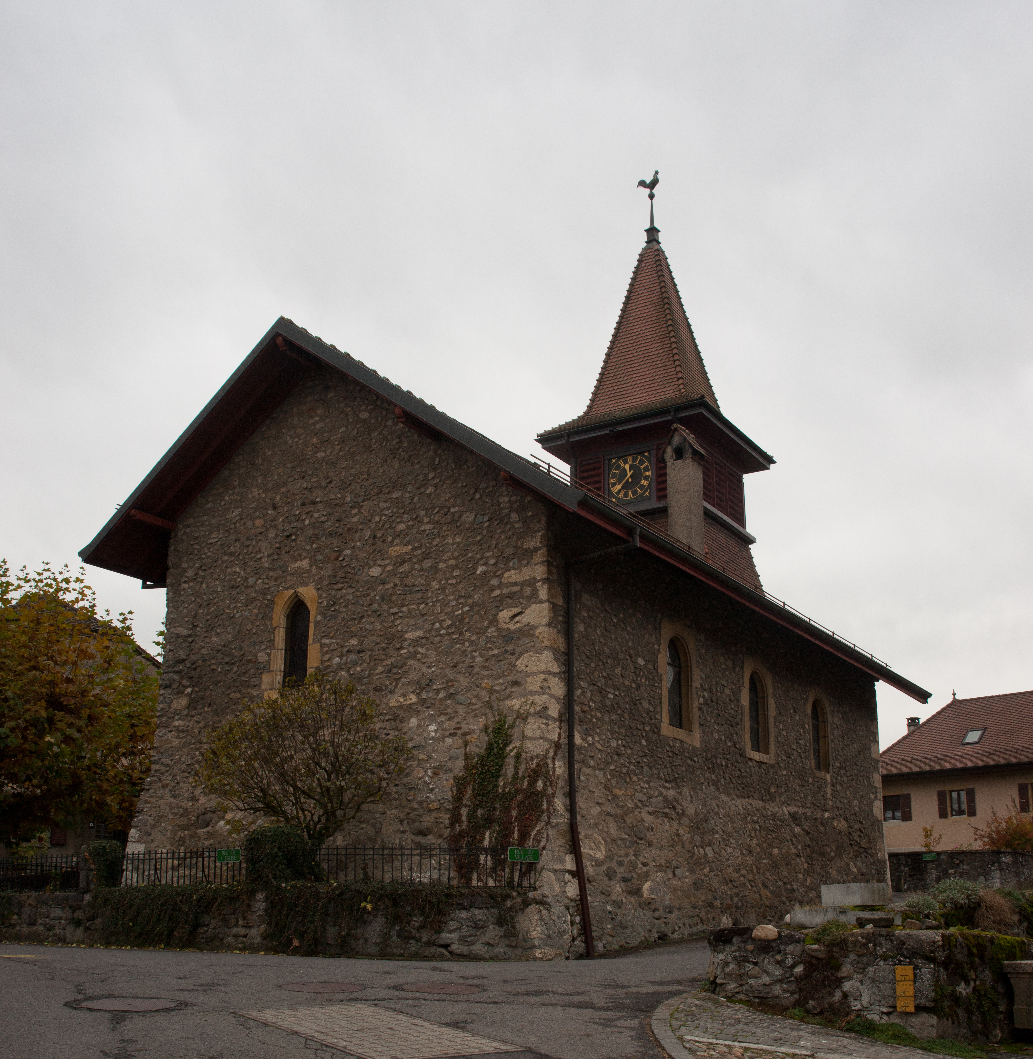 La Chaux - temple.